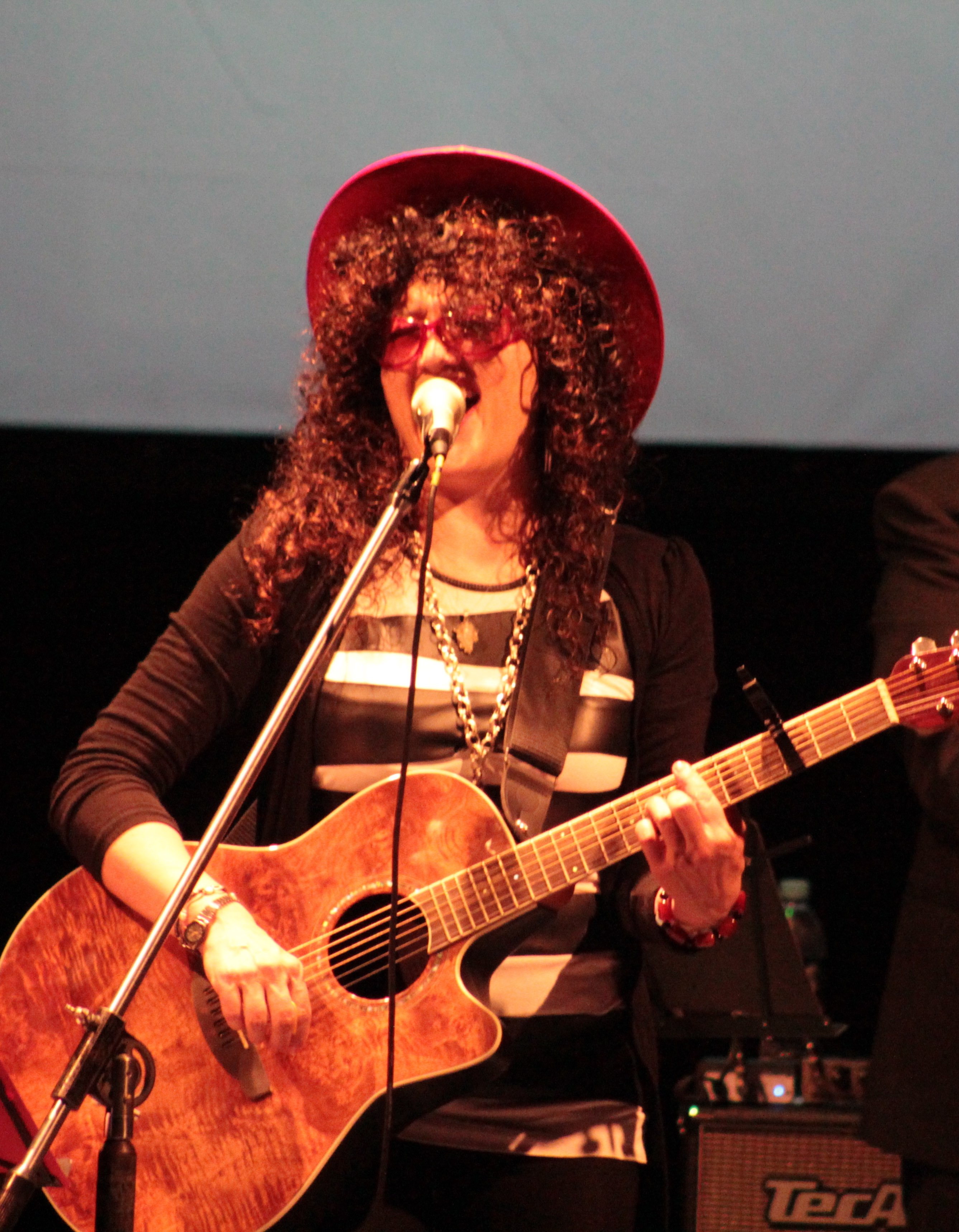 Sibah en el concierto del festival internacional: Festijazz